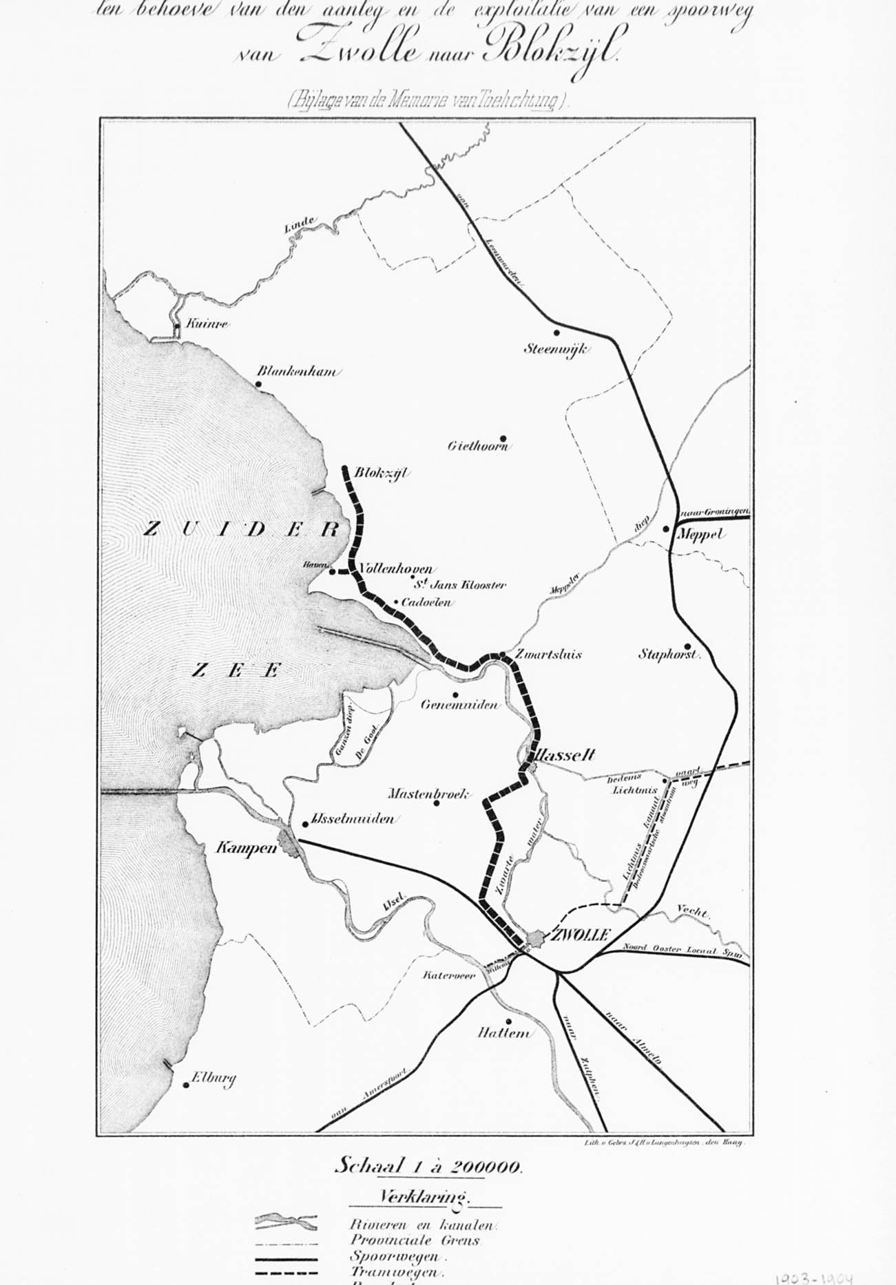 Op de kaart zijn tevens bestaande spoor-, tram- en paardentramwegen ingetekend